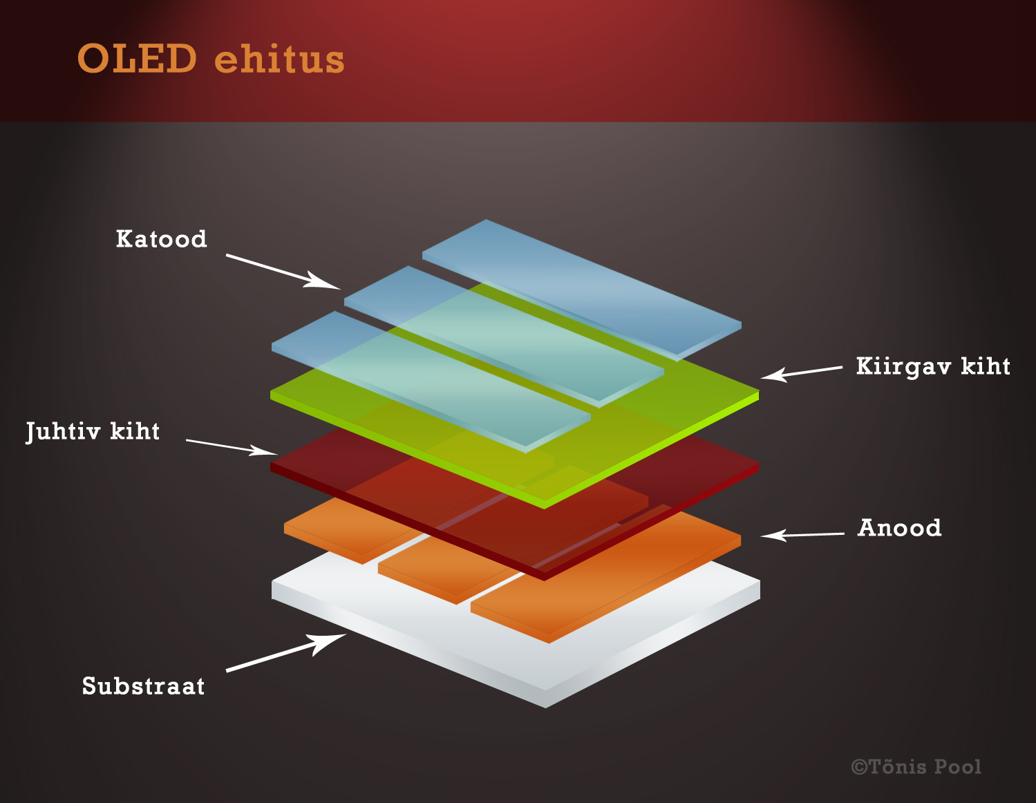 Pildil kujutatakse lihtsustatult OLEDi ehitust